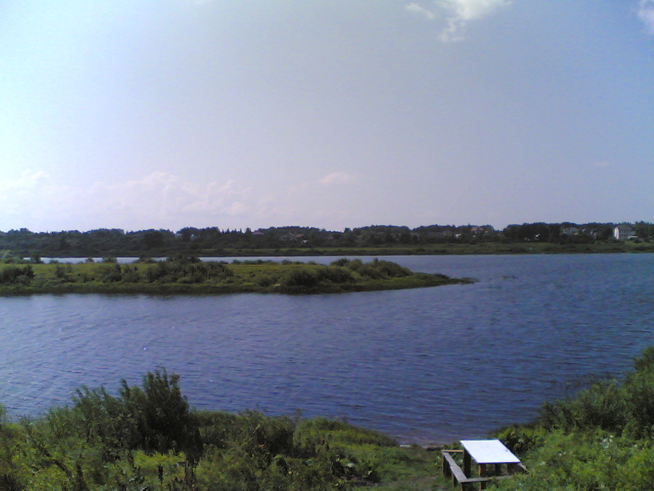 река Черёха при впадении в реку Великую